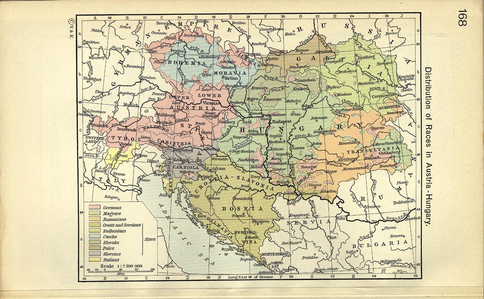 Этническая карта Австро-Венгрии на 1910 г